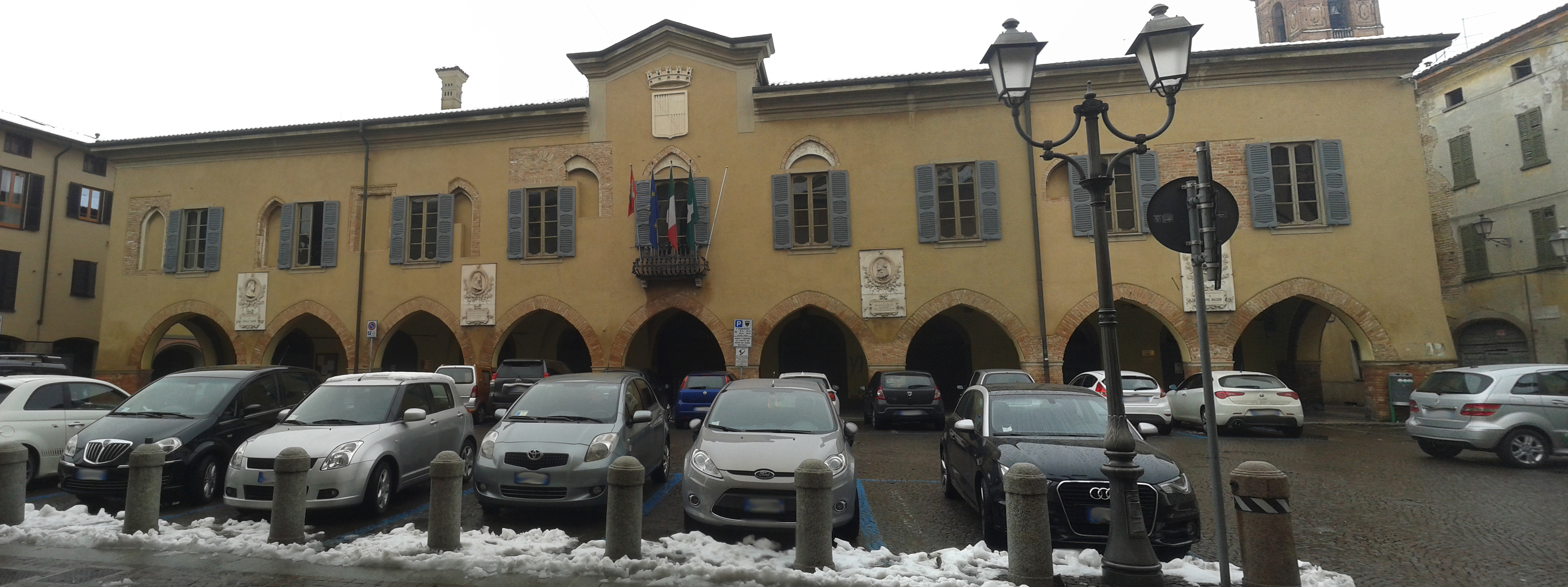 Fotografia del Palazzo Gallavresi di Caravaggio (BG), sede del comune.